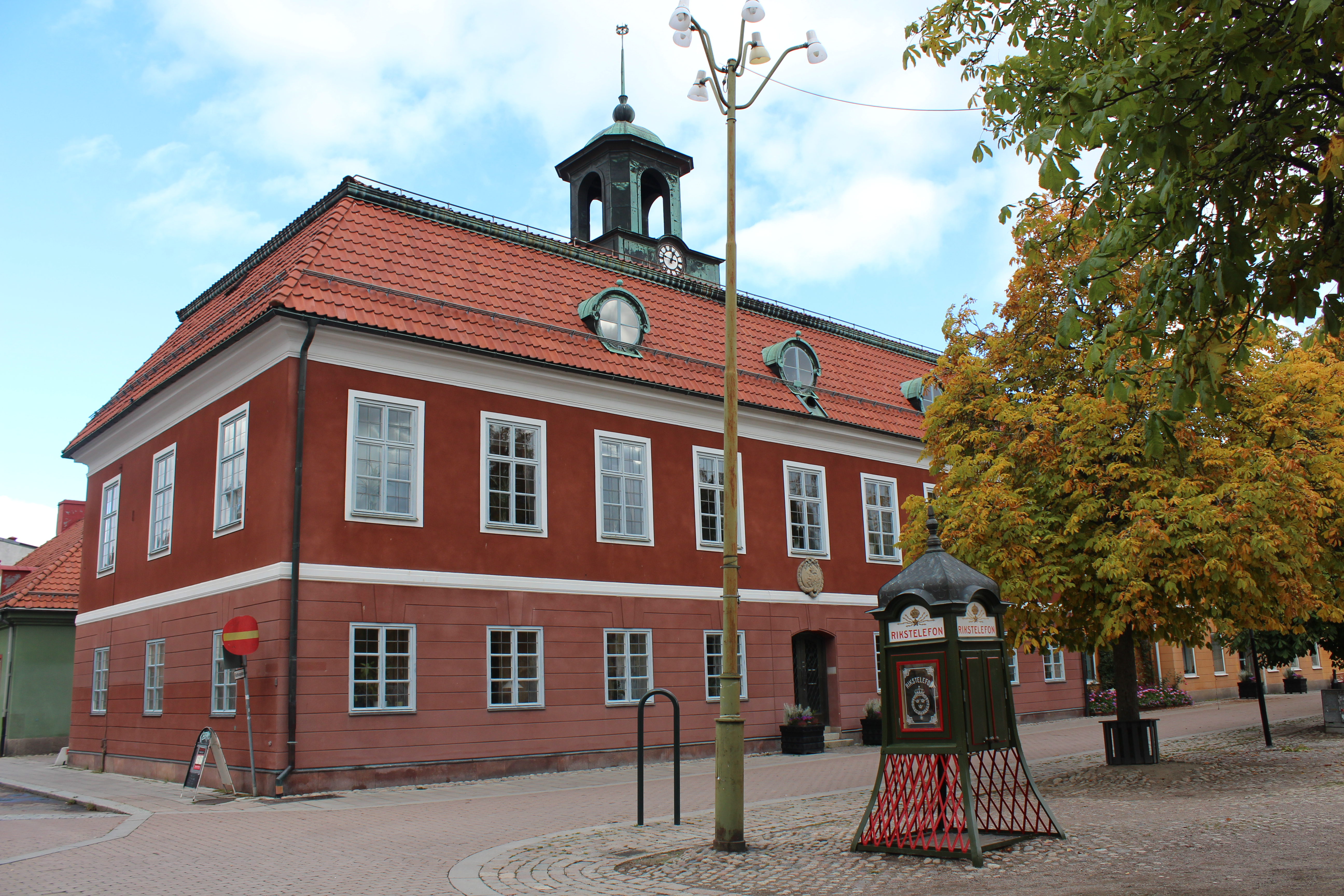 RÅDHUSET, SALA